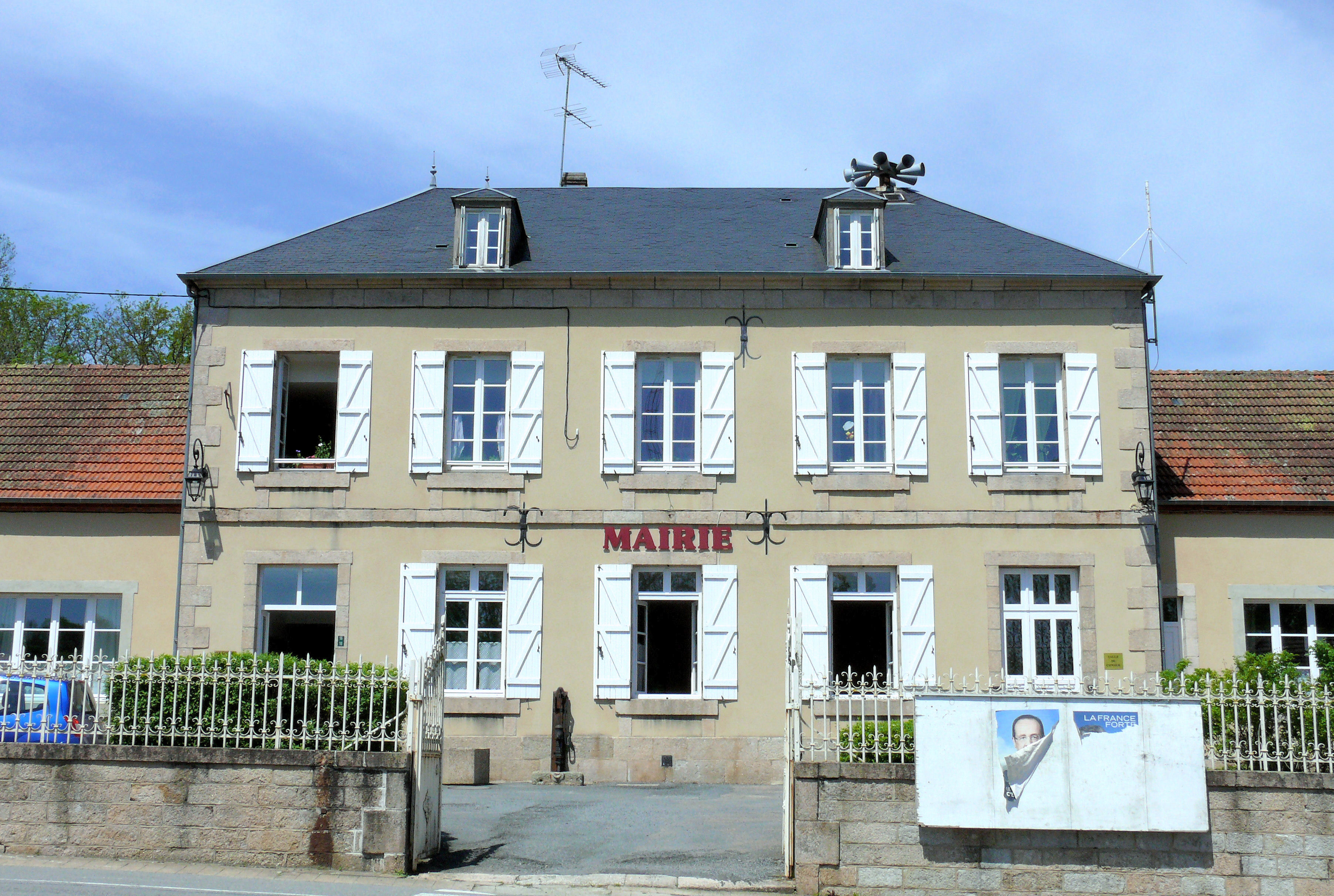 Clugnat - Mairie